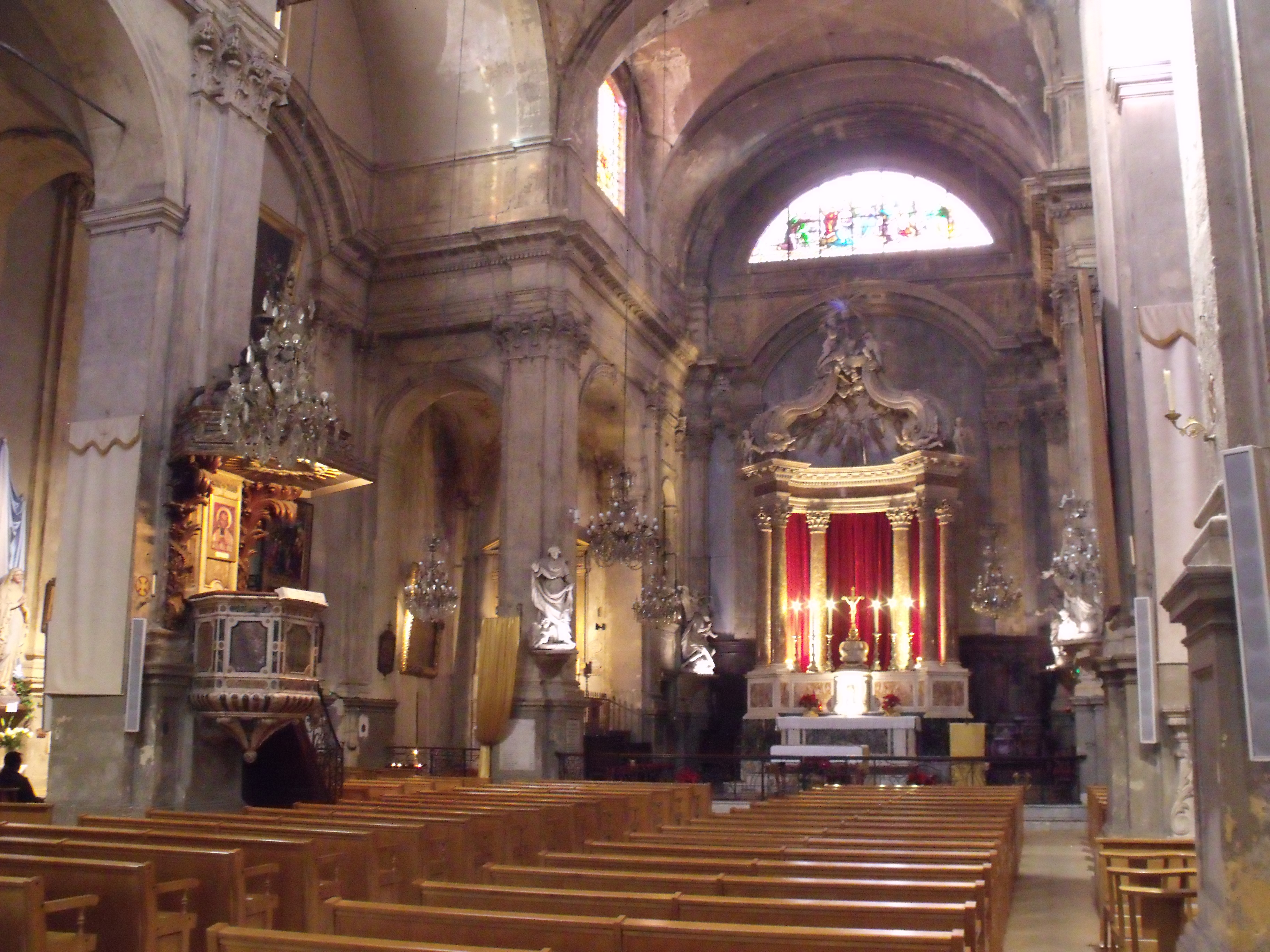 Église du Saint-Esprit. Aix-en-Provence. Rue Espariat.